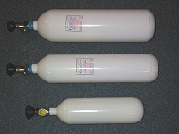 monopale et bi palmes en fibres de verre